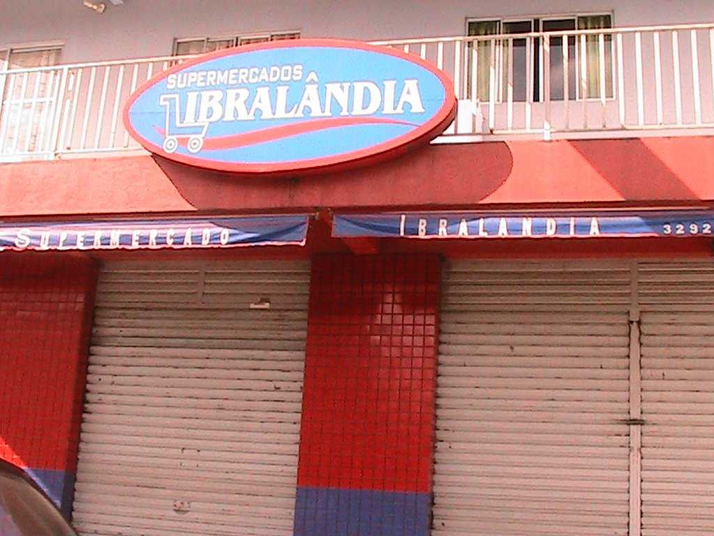 Supermercados Ibralândia, em Bom Jardim de Minas, Minas Gerais, Brasil.